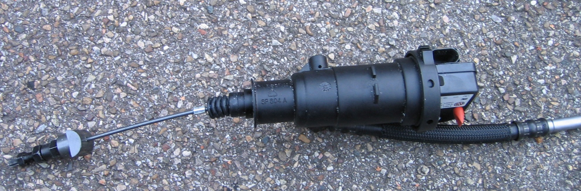 Kupplungsneherzylinder mit Positionspoti Lupo 3L